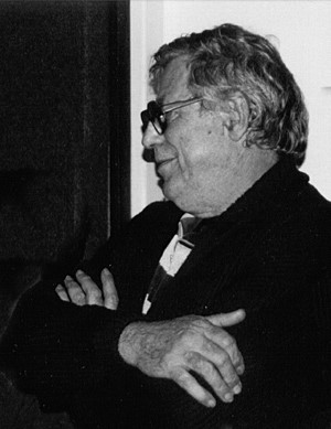 Kazimierz Zbigniew Łoński w Widzewskiej Galerii Ekslibrisu w Łodzi. Fotografował Mirosław Zbigniew Wojalski CC-BY-SA 4.0